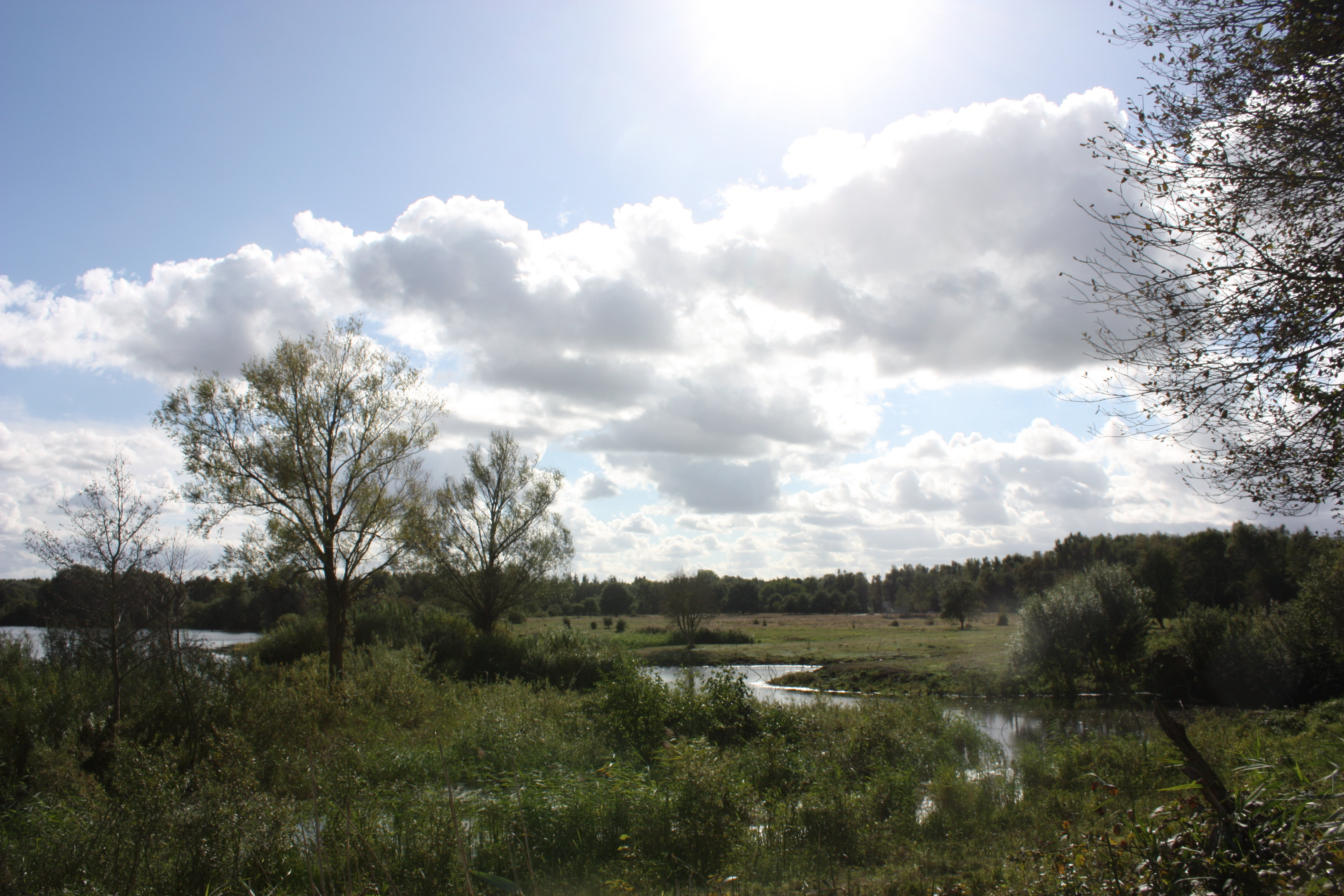 Ansicht aus dem Naturschutzgebiet Untere Seeveniederung, im Hintergrund der „Seevengeti“-Aussichtsturm